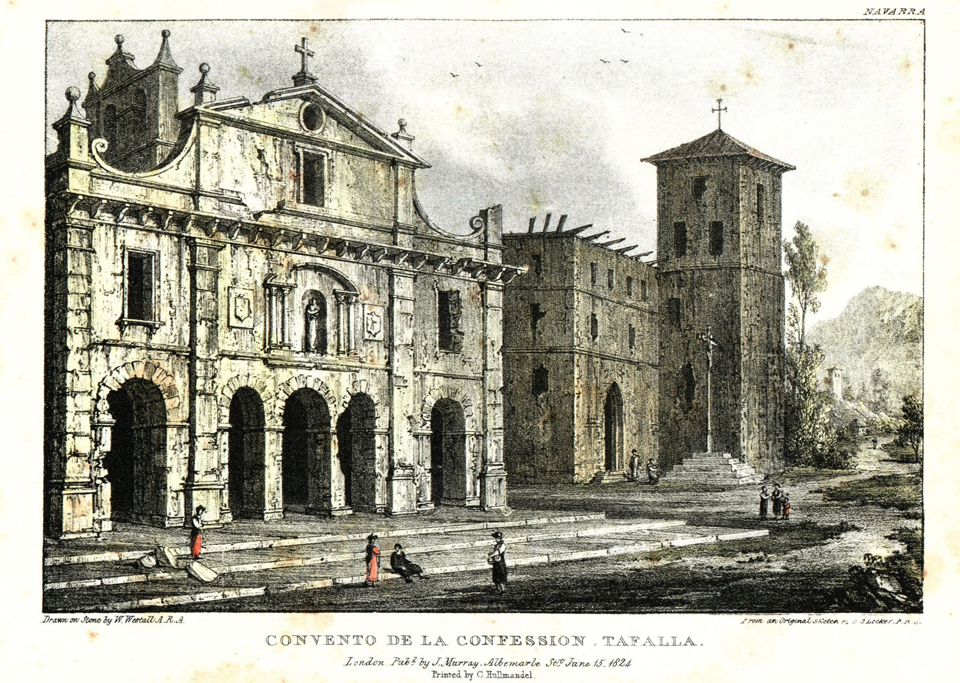 Grabado del convento de las Recoletas y el Palacio de los Mencos de Tafalla, en fase de reconstrucción tras la Guerra de la Independencia.